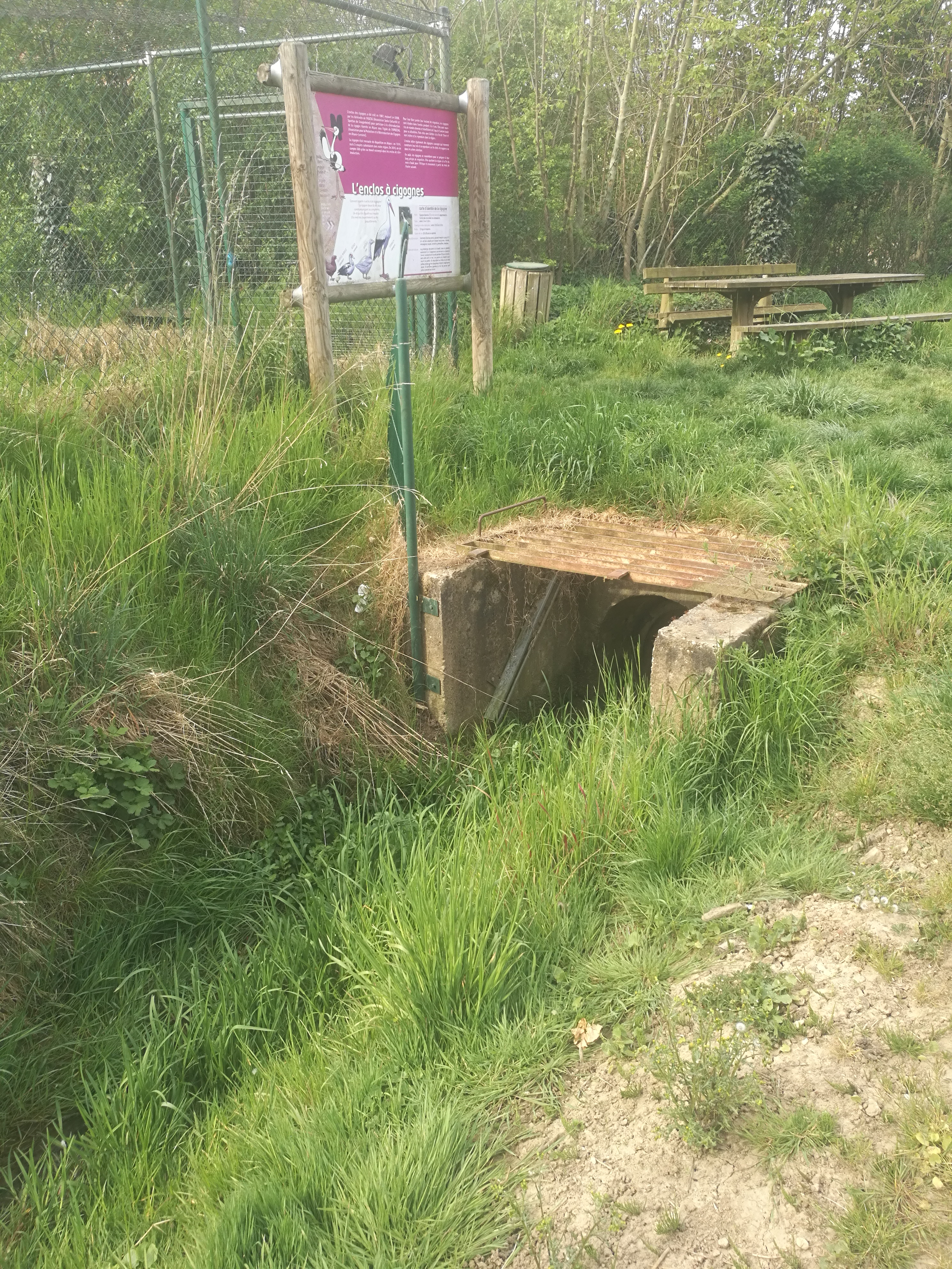 Buse du Dorfgraben passant sous le village de Gougenheim devant le parc à cigognes